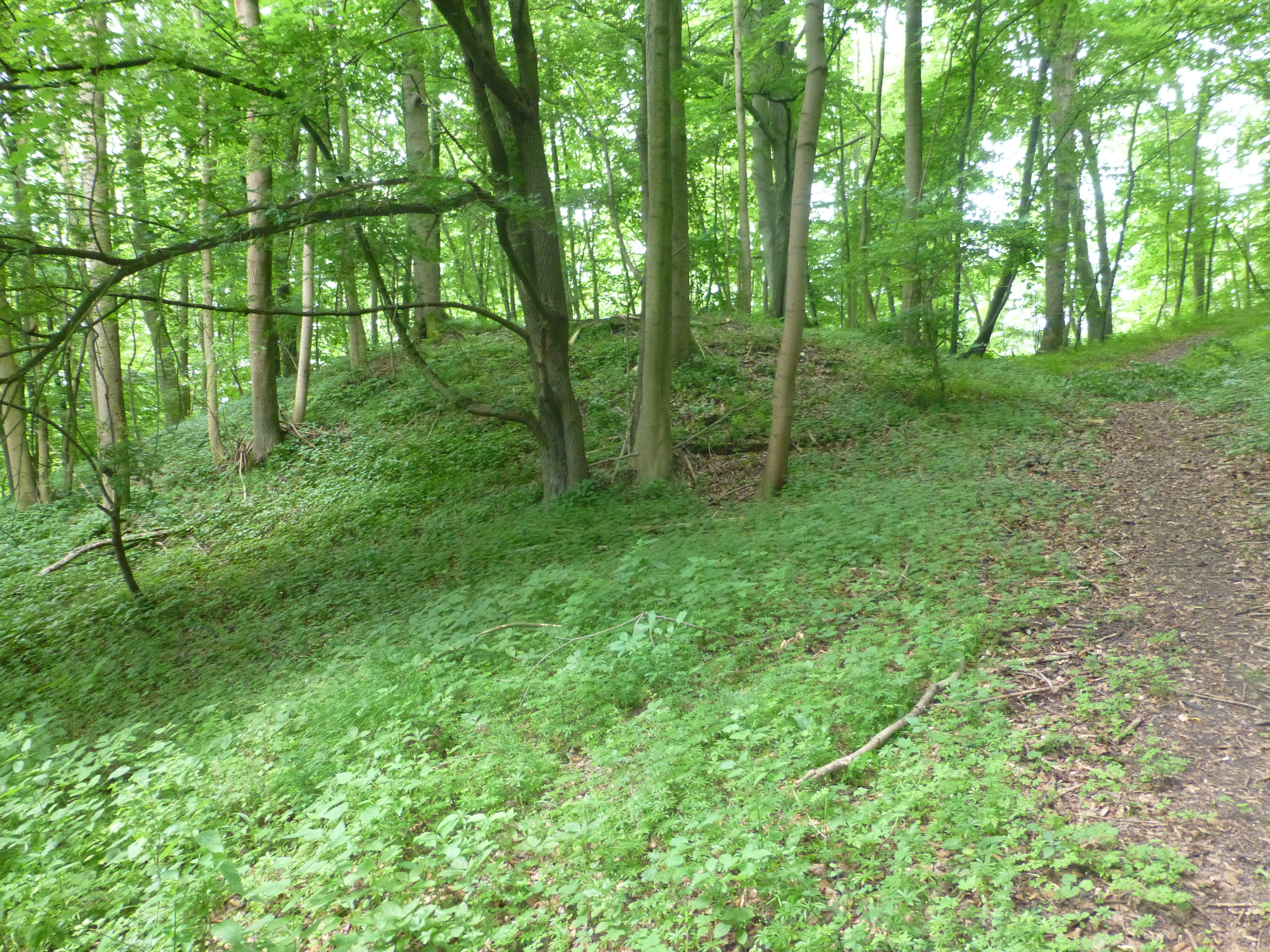 Standort der ehemaligen St.-Georgs-Kapelle